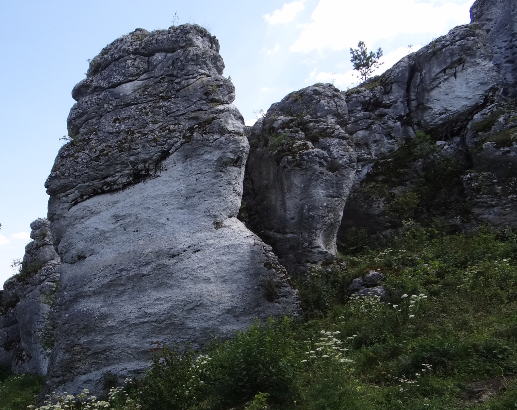 Krótka Grzęda w grupie skał Mirowskich. Widok od zachodu